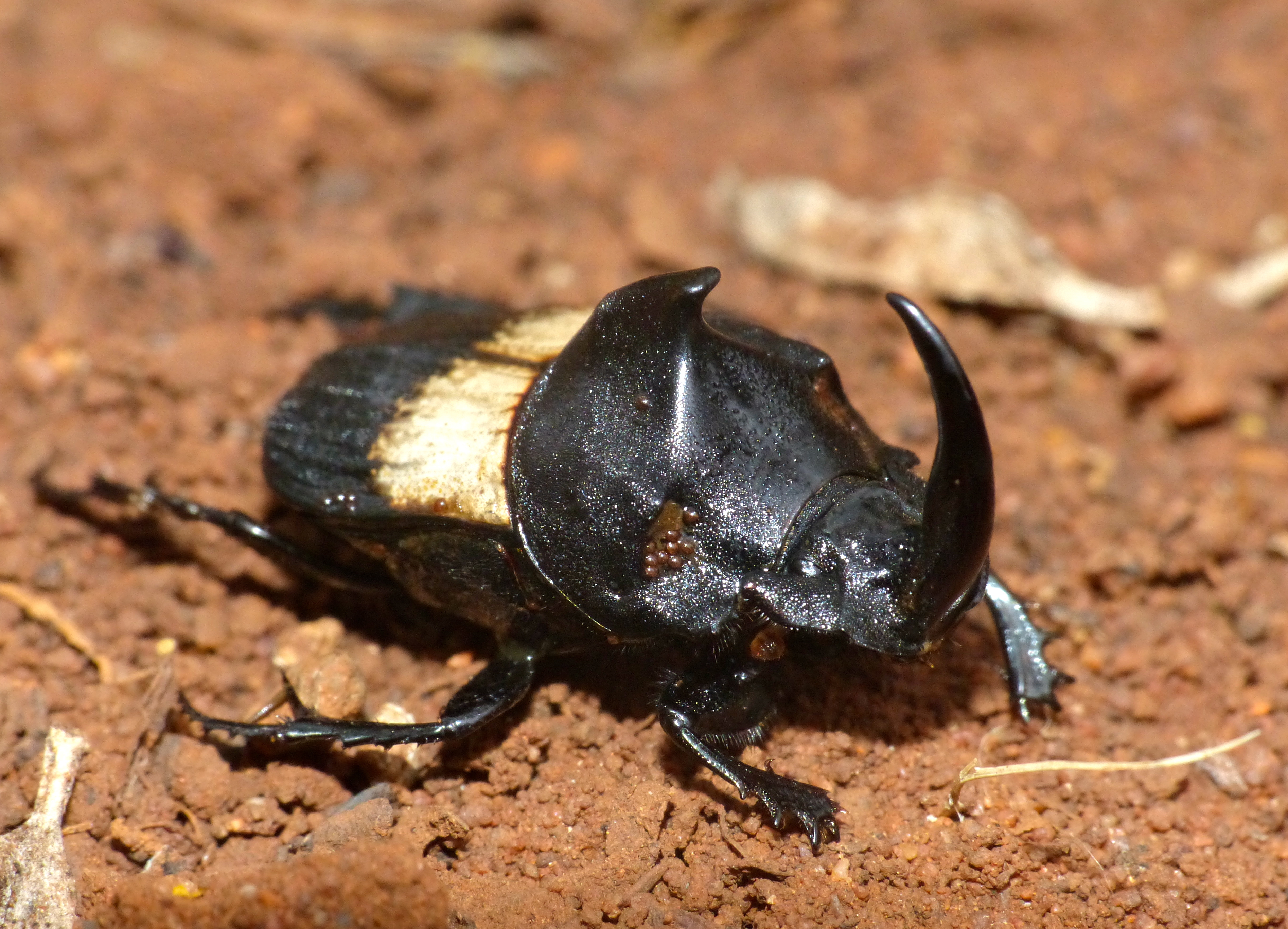 Mahonie Loop near Punda Maria, Kruger NP, SOUTH AFRICA